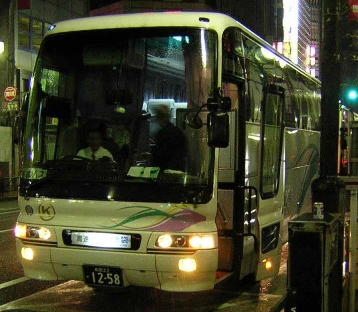 登録番号 長岡22か12-58 頸城自動車所属 東京～上越線用 2004年4月8日 池袋駅東口にて撮影